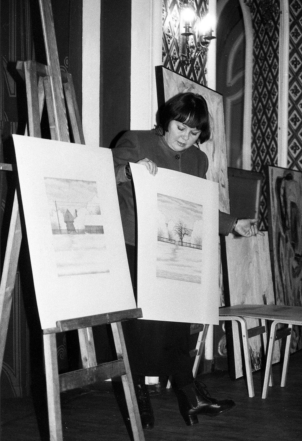 Mare Vint, eesti graafik 1994